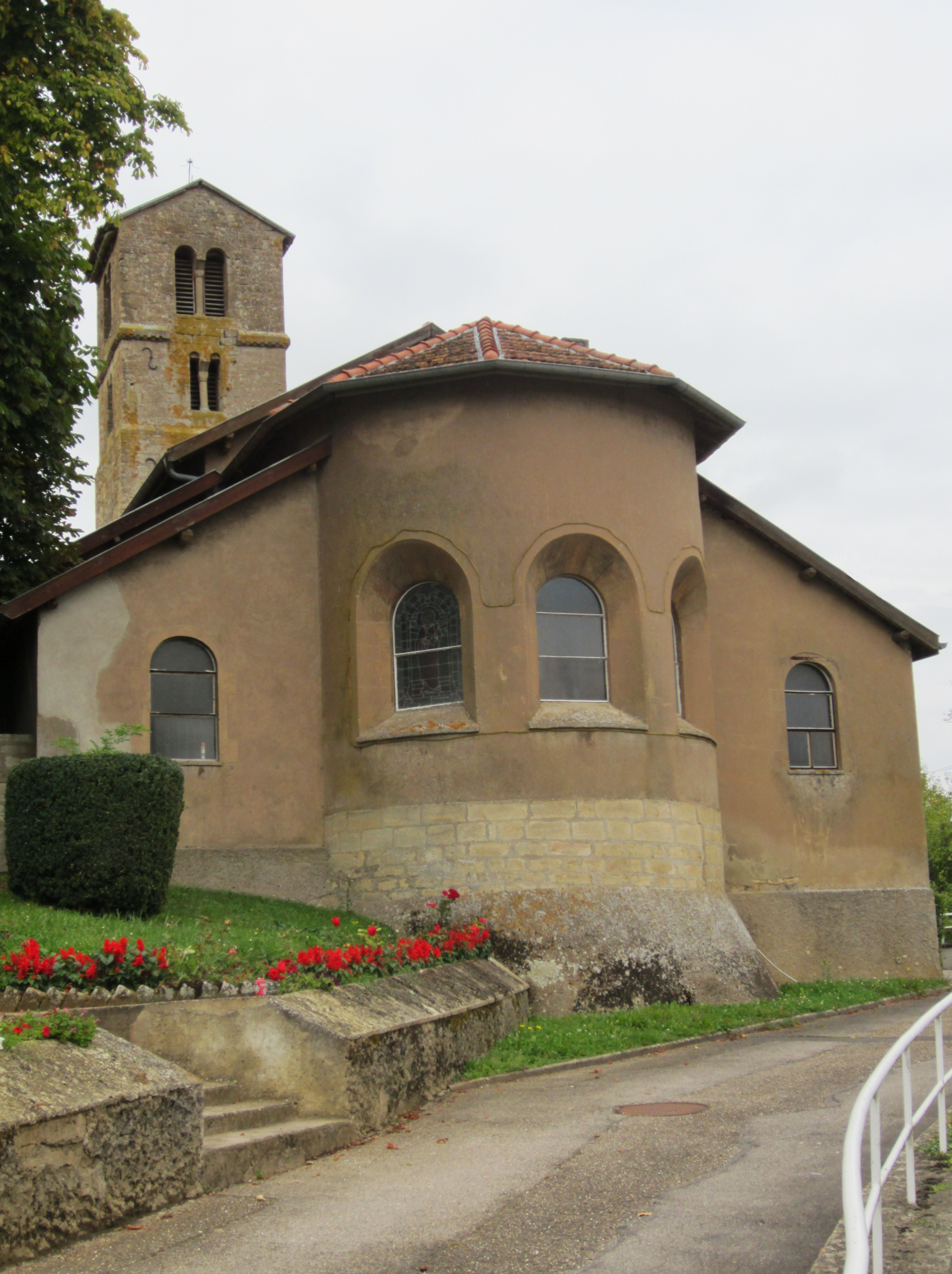 Description eglise Mancieulles Date21 September 2011Sourcemon appareil photoAuthorAimelaimePermission (Reusing this file) eglise Mancieulles